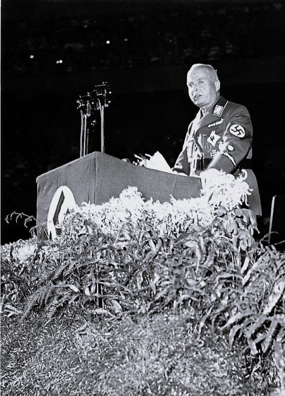 Karl-Eduard von Sachsen-Coburg und Gotha Festkundgebung des Roten Kreuzes, Reichsfrauenbund in der Deutschlandhalle Der Präsident des Deutschen Roten Kreuzes spricht (Herzog von Coburg) Bild: Nordhausen Abgebildete Personen: Sachsen-Coburg und Gotha, Karl-Eduard von: 1884-1954, Herzog, Präsident des Deutschen Roten Kreuzes, Deutschland Information added by Wikimedia users. Correction & addendum: (Korrektur & Ergänzung) Carl Eduard Herzog von Sachsen-Coburg und Gotha Rede zur Festkundgebung des 70-jährigen DRK-Jubiläums, 11. November 1936 in der Deutschlandhalle Source: (Quelle) Harald Sandner: Hitlers Herzog - Carl Eduard von Sachsen-Coburg und Gotha - Die Biographie Shaker Media, Aachen 2011, ISBN 978-3-86858-598-8, S.315